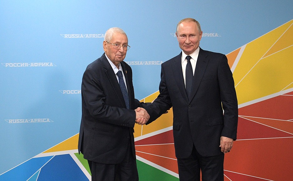 Réunion de Poutine et Bensalah à Sotchi